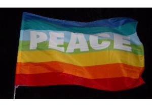 en: Peace flag with English word. Produced by Peace Flag Project, Japan, 2004. ja: 平和の旗 (英語)。制作 ぴーすばたプロジェクト (2004年)。